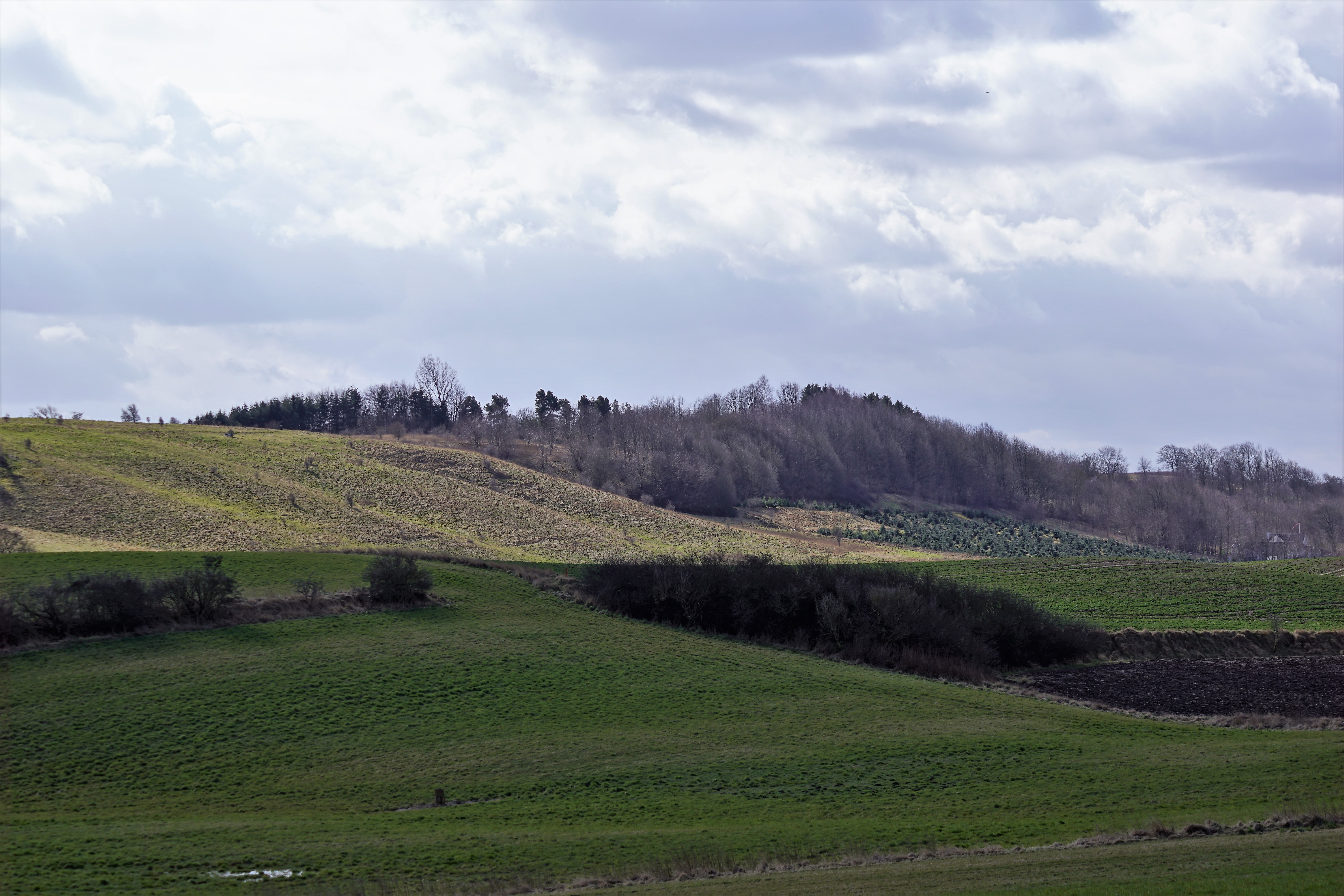 Holm Bjerge set fra nord